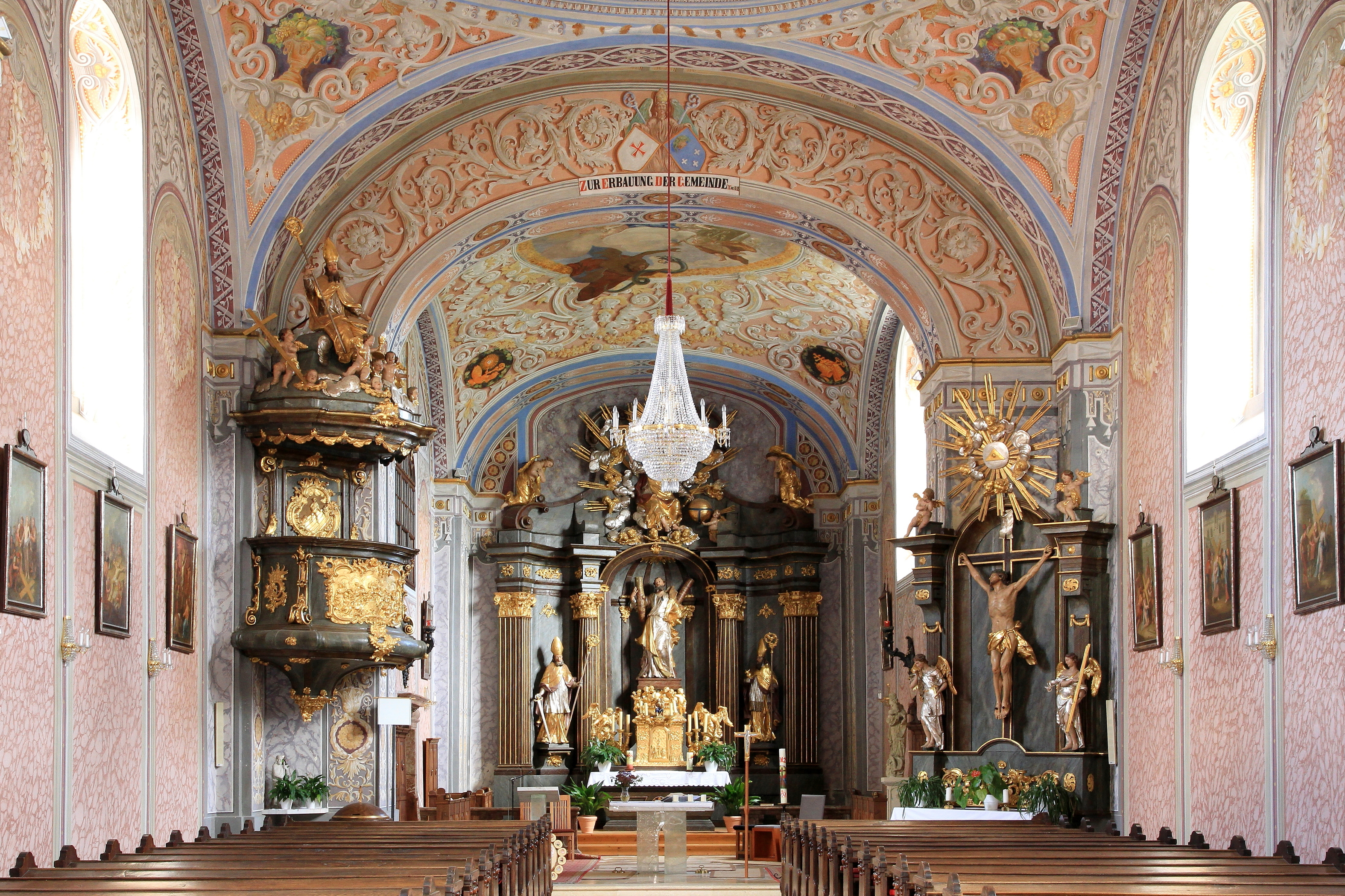 Innenansicht der katholischen Pfarrkirche hl. Andreas in der niederösterreichischen Marktgemeinde Grafenwörth. Der Hochaltar, ein klassizistischer Säulenaltar, stammt aus dem Jahre 1780 und die Rokoko-Kanzel aus der zweiten Hälfte des 18. Jahrhunderts. Die Hochaltarskulpturen sind ein Werk von Johann Schmidt, Vater vom sogenannten „Kremser Schmidt“, und die Deckenfresken schuf Leopold Mitterhofer, ein Schüler des „Kremser Schmidt“.